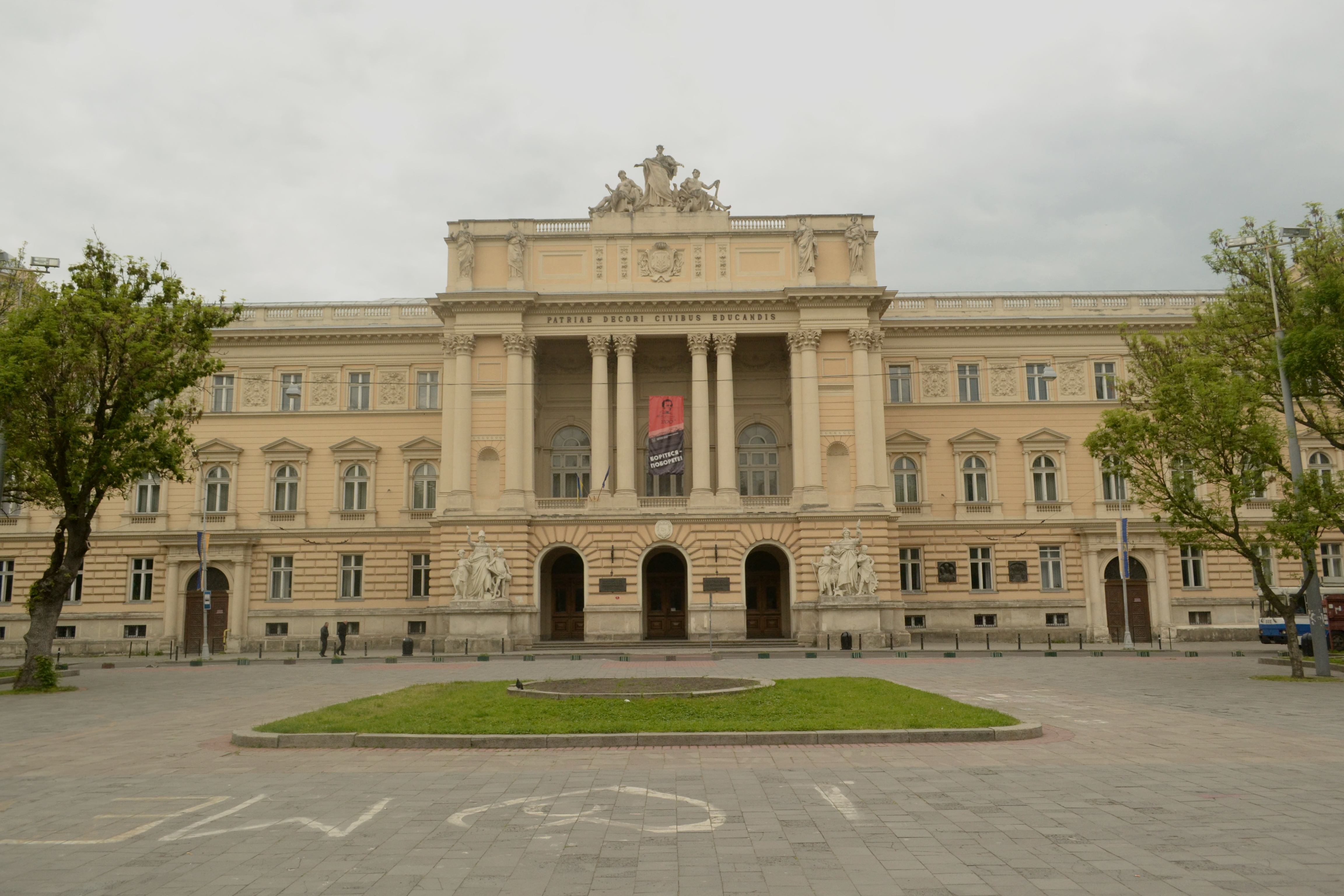 Головний навчальний корпус університету, в якому працювали видатні українські математики Зарицький М., Левицький В., Чайковський М. і вчені україністи Головацький Я., Огоновський О., Возняк М., Сімович В., Ковалик І. (Будинок галицького сейму), Львів, Університетська, 1